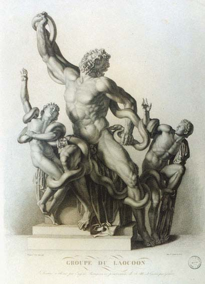 Laocoonte, gravura em metal, 62,0 x 39,5 cm